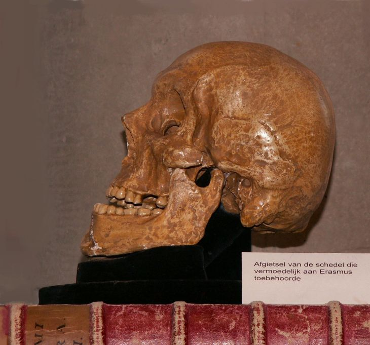 Eigen opname. Bron: Kamer van de Erasmus-collectie, GemeenteBibliotheek Rotterdam (Hoofdvestiging Hoogstraat) Met dank aan de medewerkers aldaar en aan de medewerkers aan de balie die me de juiste wegen gewezen hebben